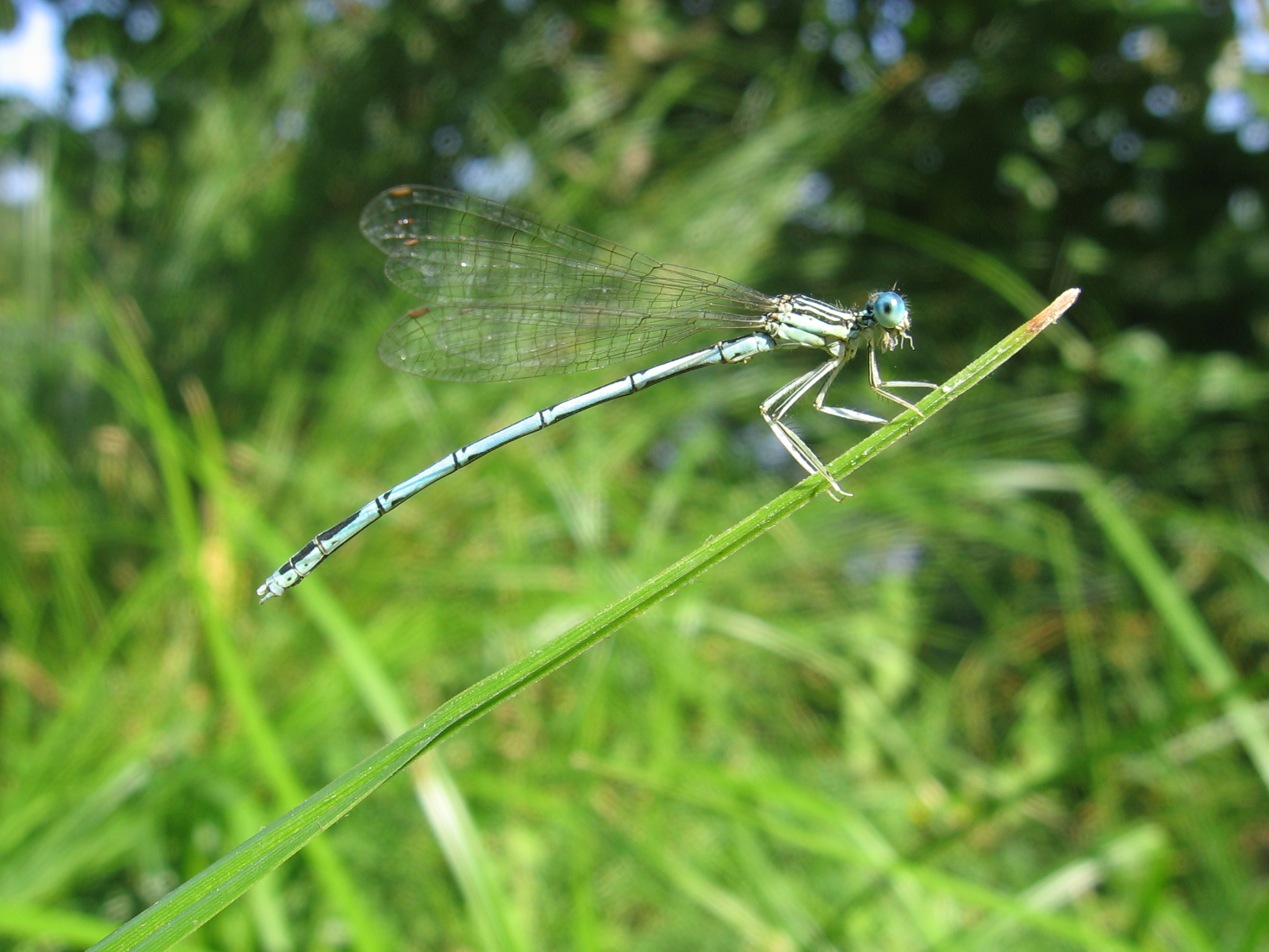 Libelle Libelle